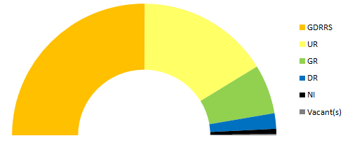 Répartition des sénateurs suivant leur groupe parlementaire après les élections sénatoriales de 1921.